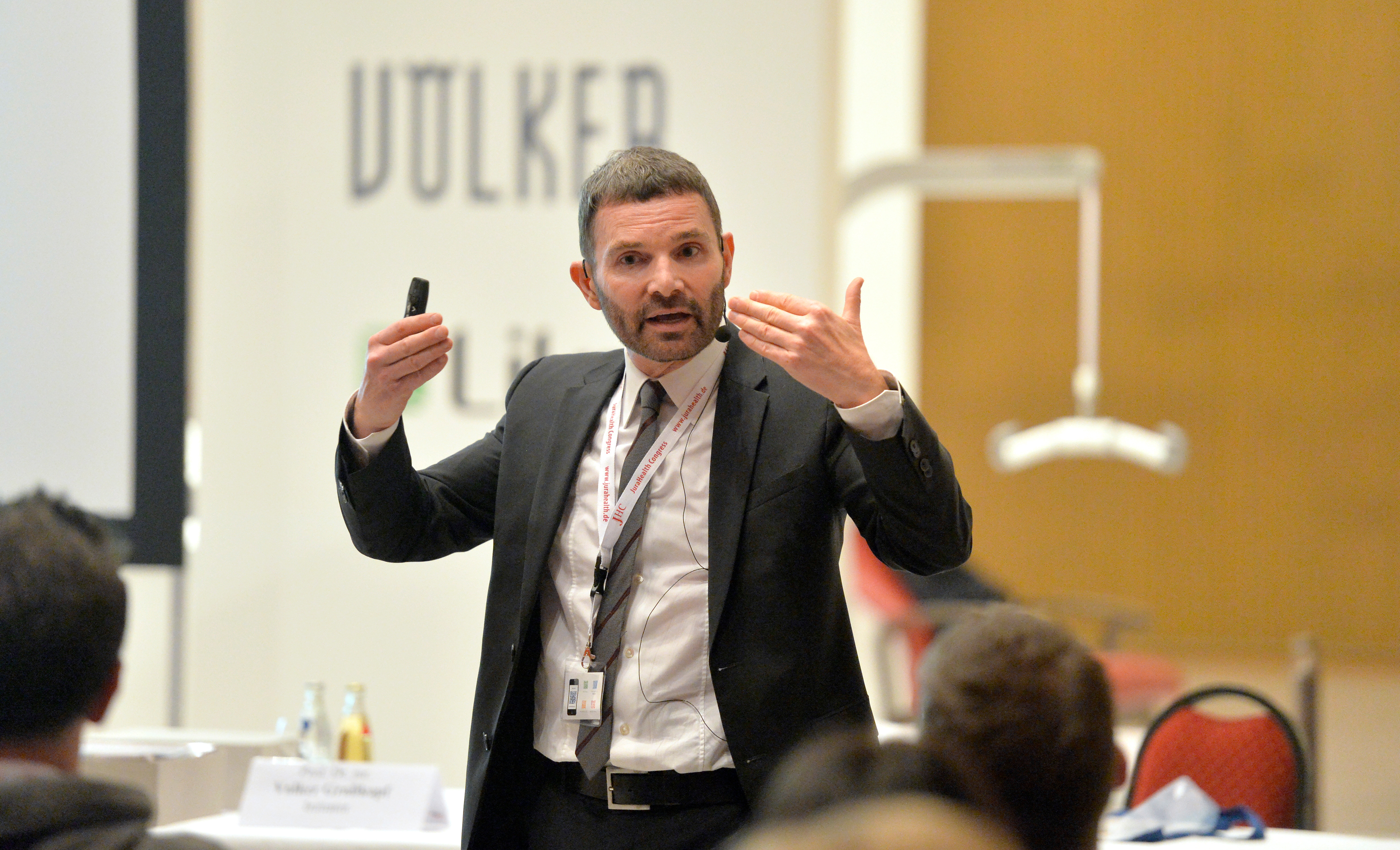 Prof. Dr. Volker Großkopf bei seinem Vortrag auf dem Begleitsymposium "Mobility is life", welches im Rahmen des JuraHealth Congress 2014 stattfand.